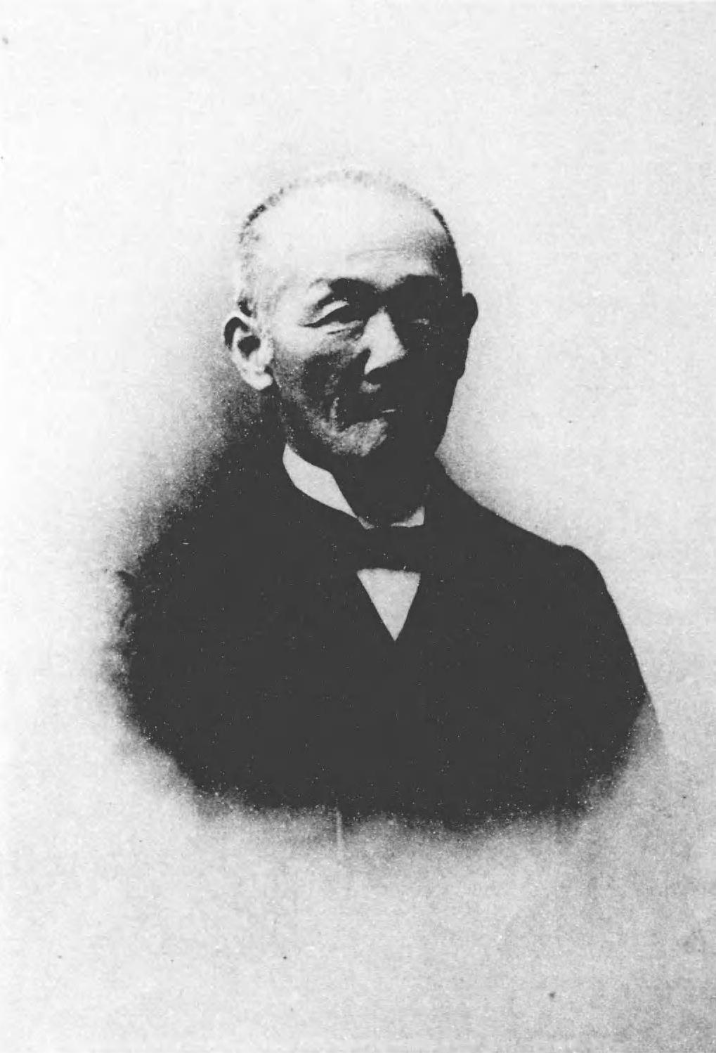 樋口杏斎65歳の真影 明治39年退職の年